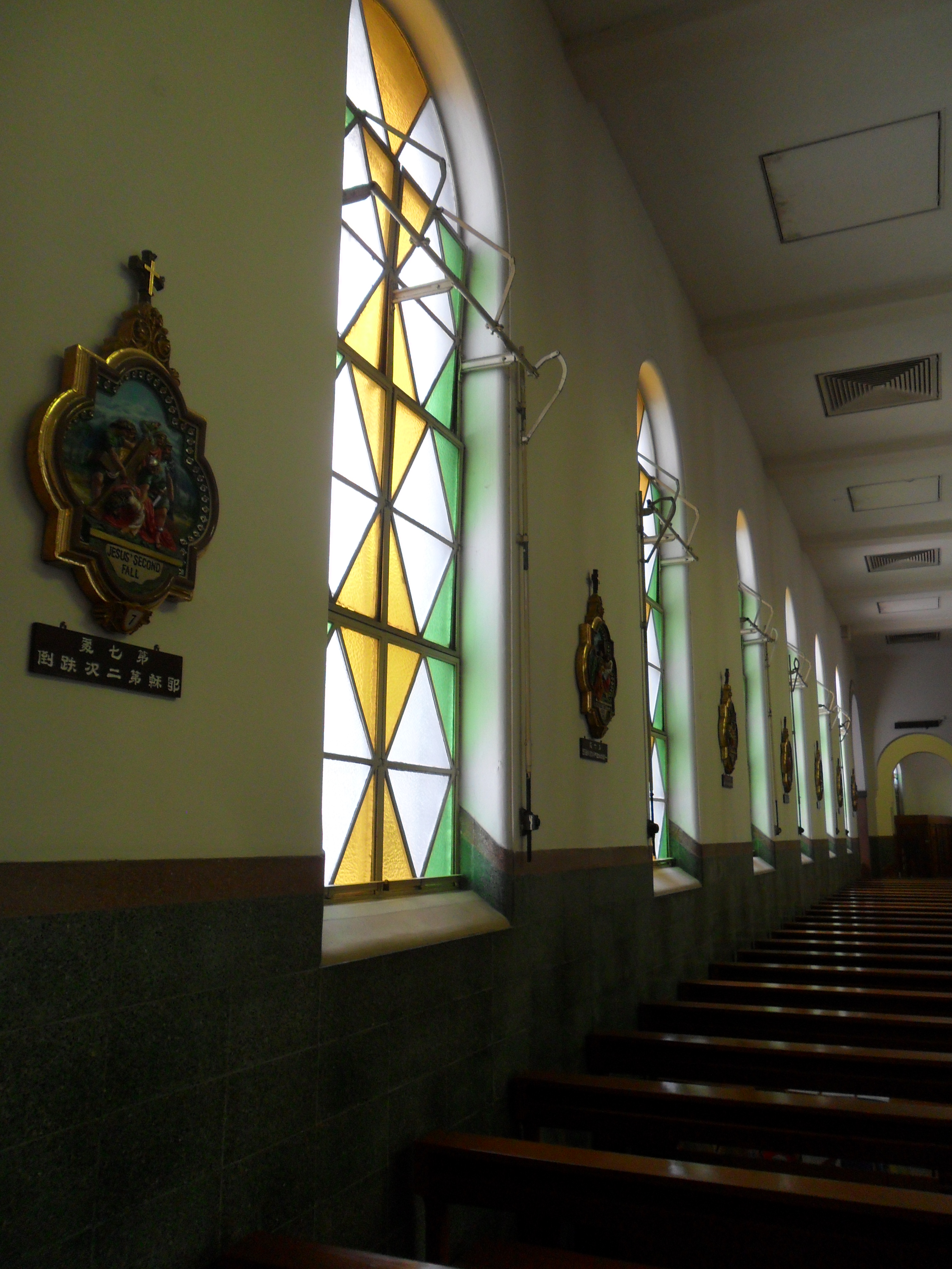 中文（香港）: 聖德肋撒堂, 香港, 中國